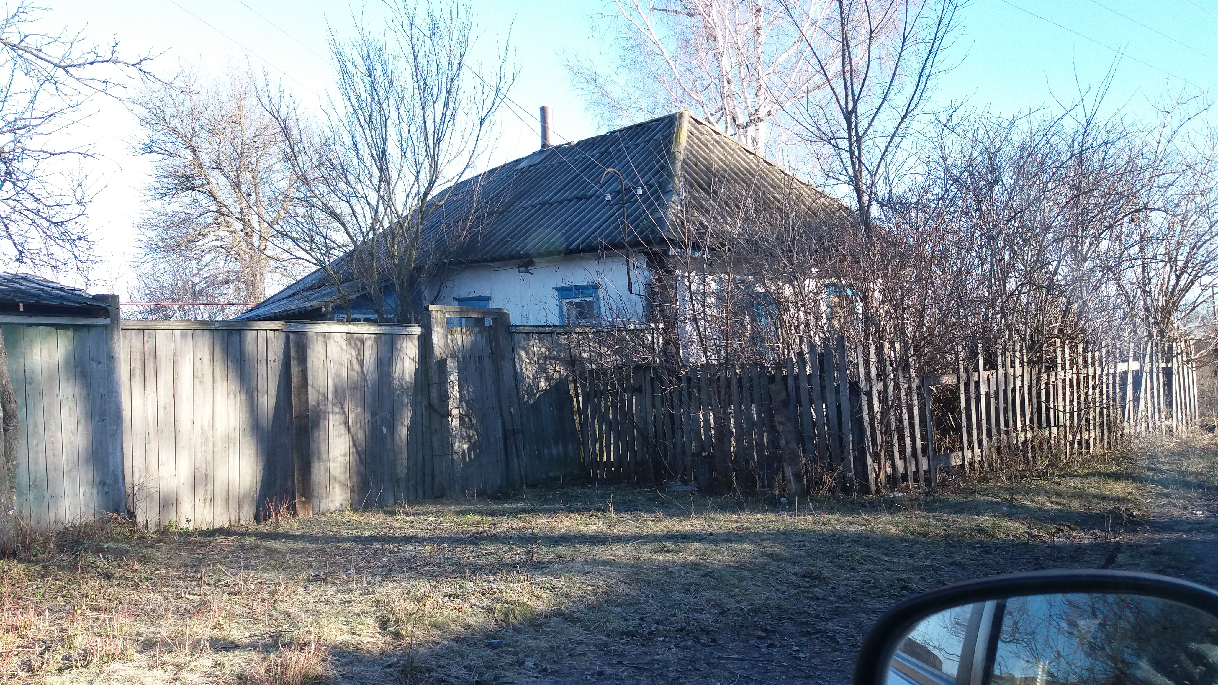 вул. Соборна с. Вільшана